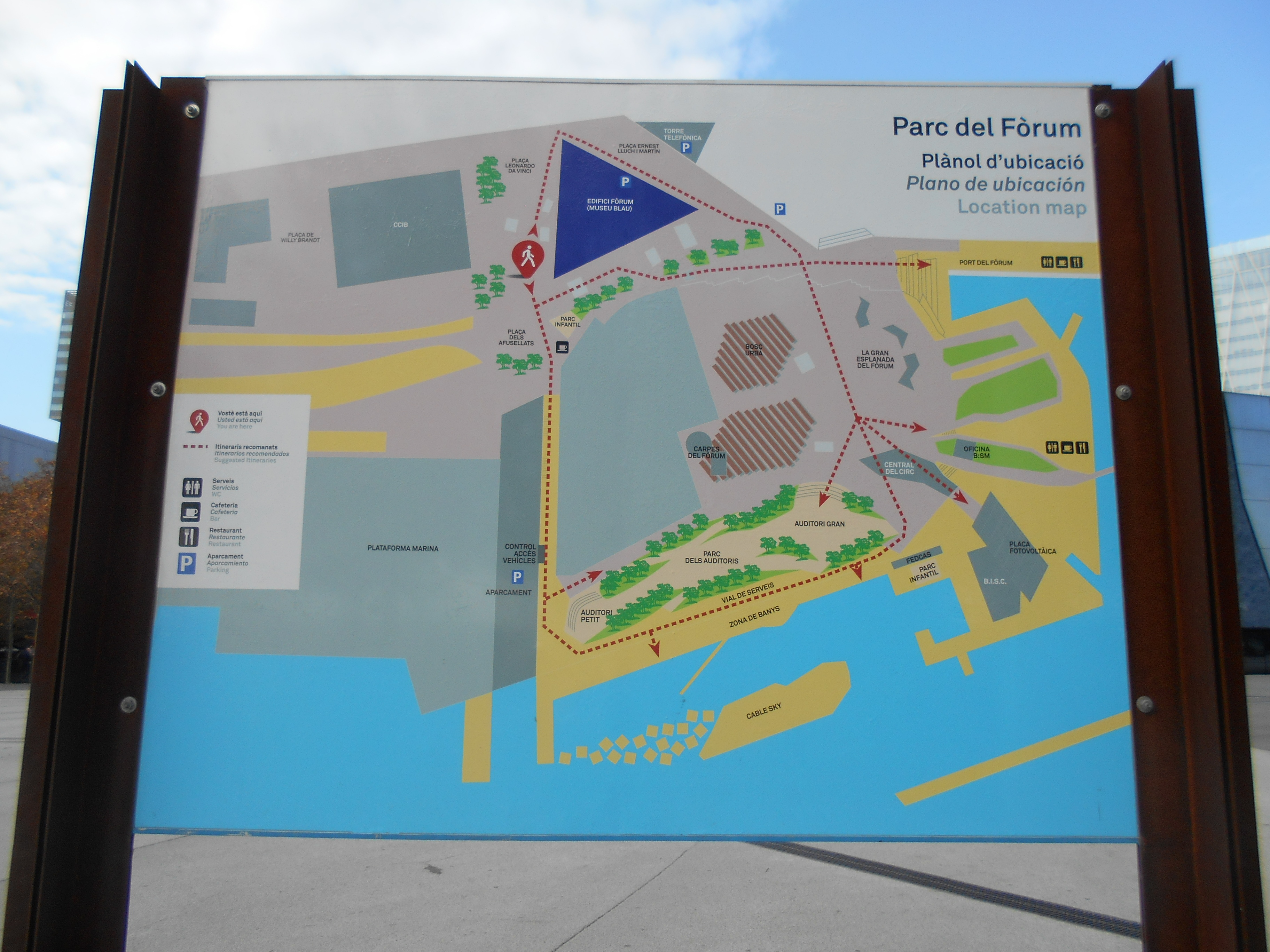 Plano del parque del Fórum.